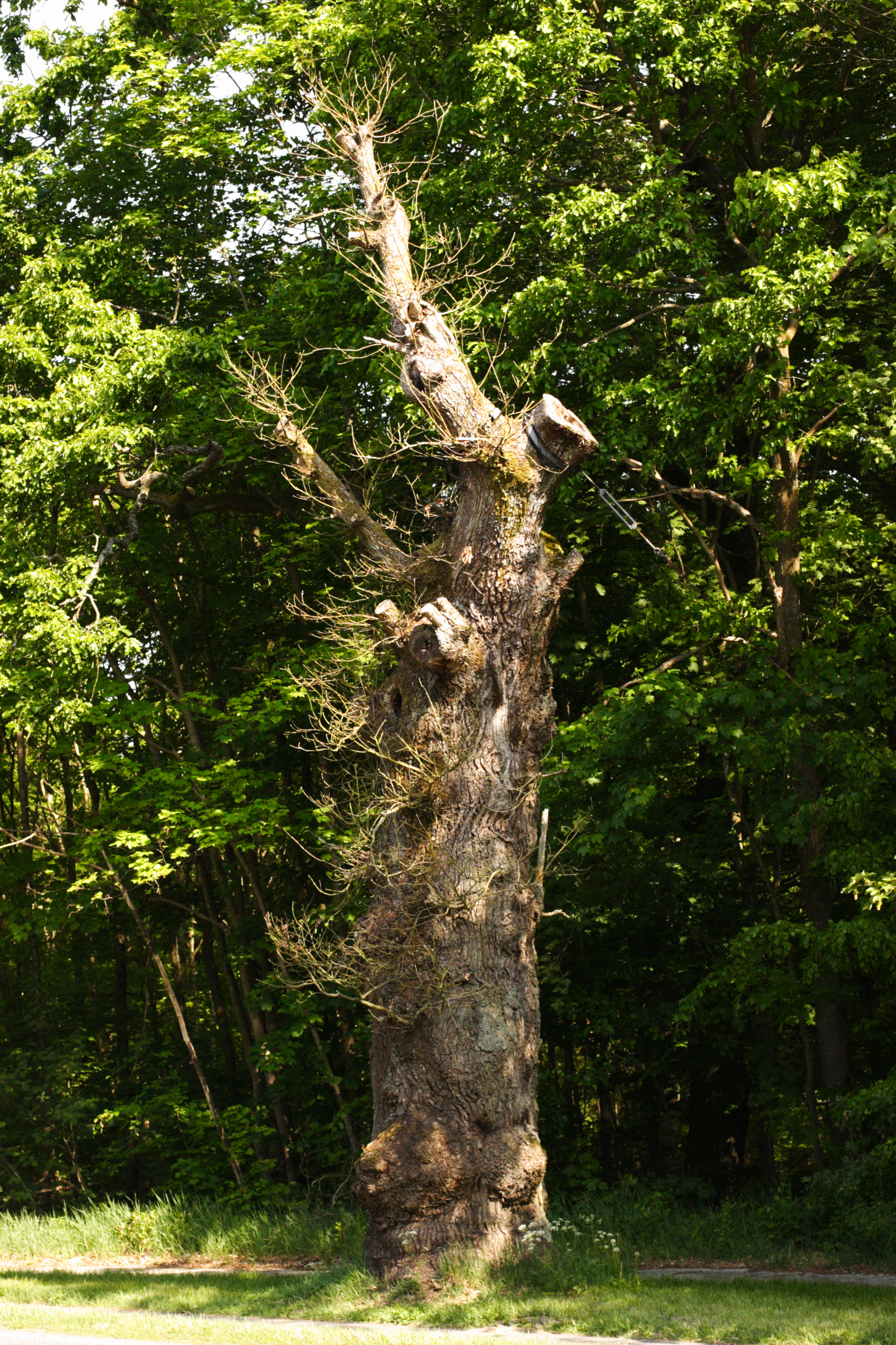 Den hule eg ved Århusbakken i Silkeborg